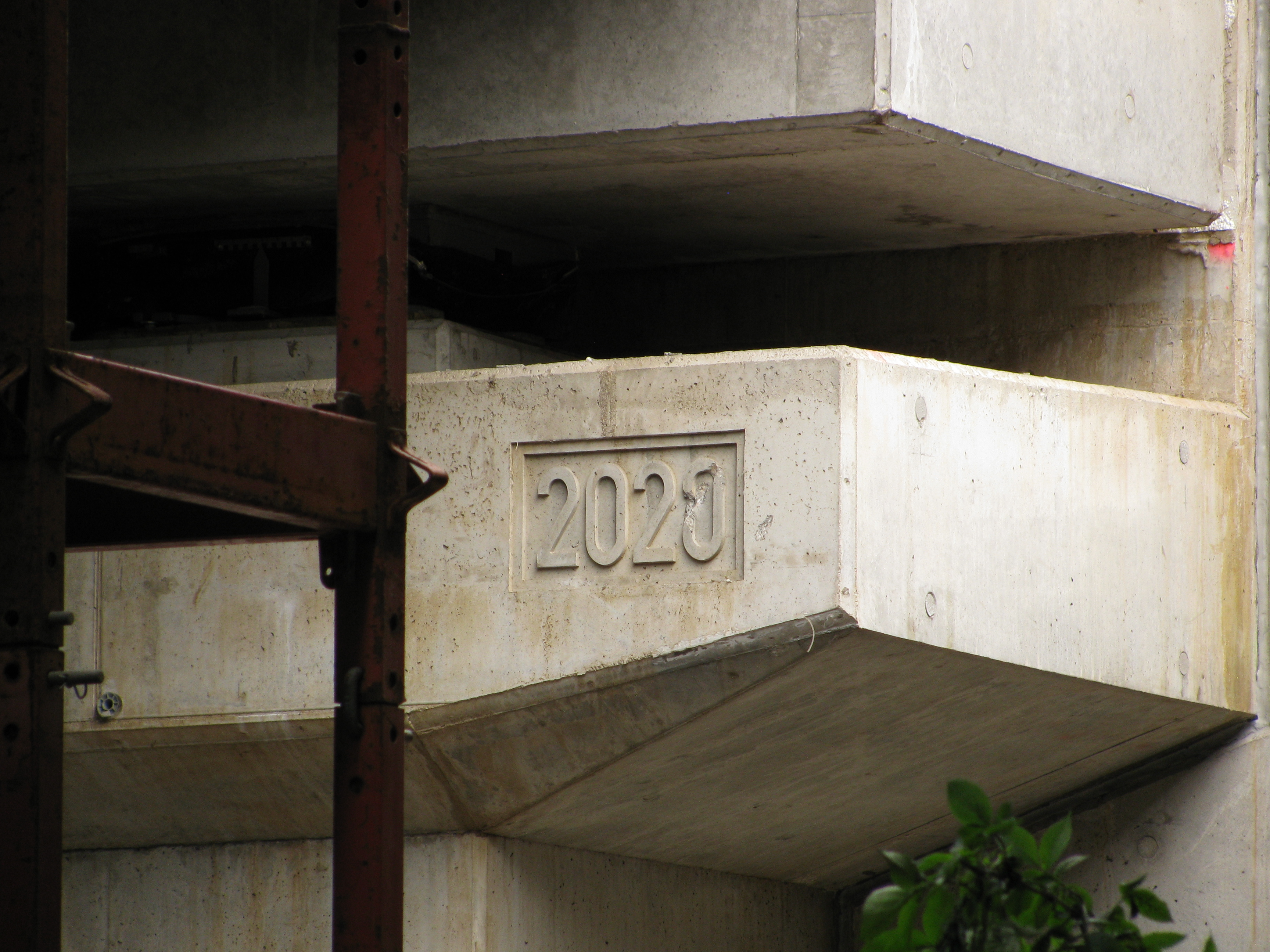 Označení roku výstavby na mostě v Průběžné ulici. Označeno rokem 2020.